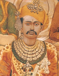 Malhar Rao Gaekwad